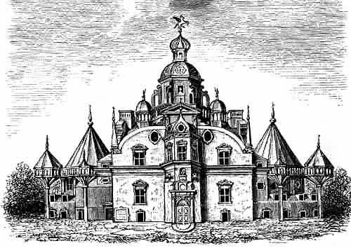 Uranienborg